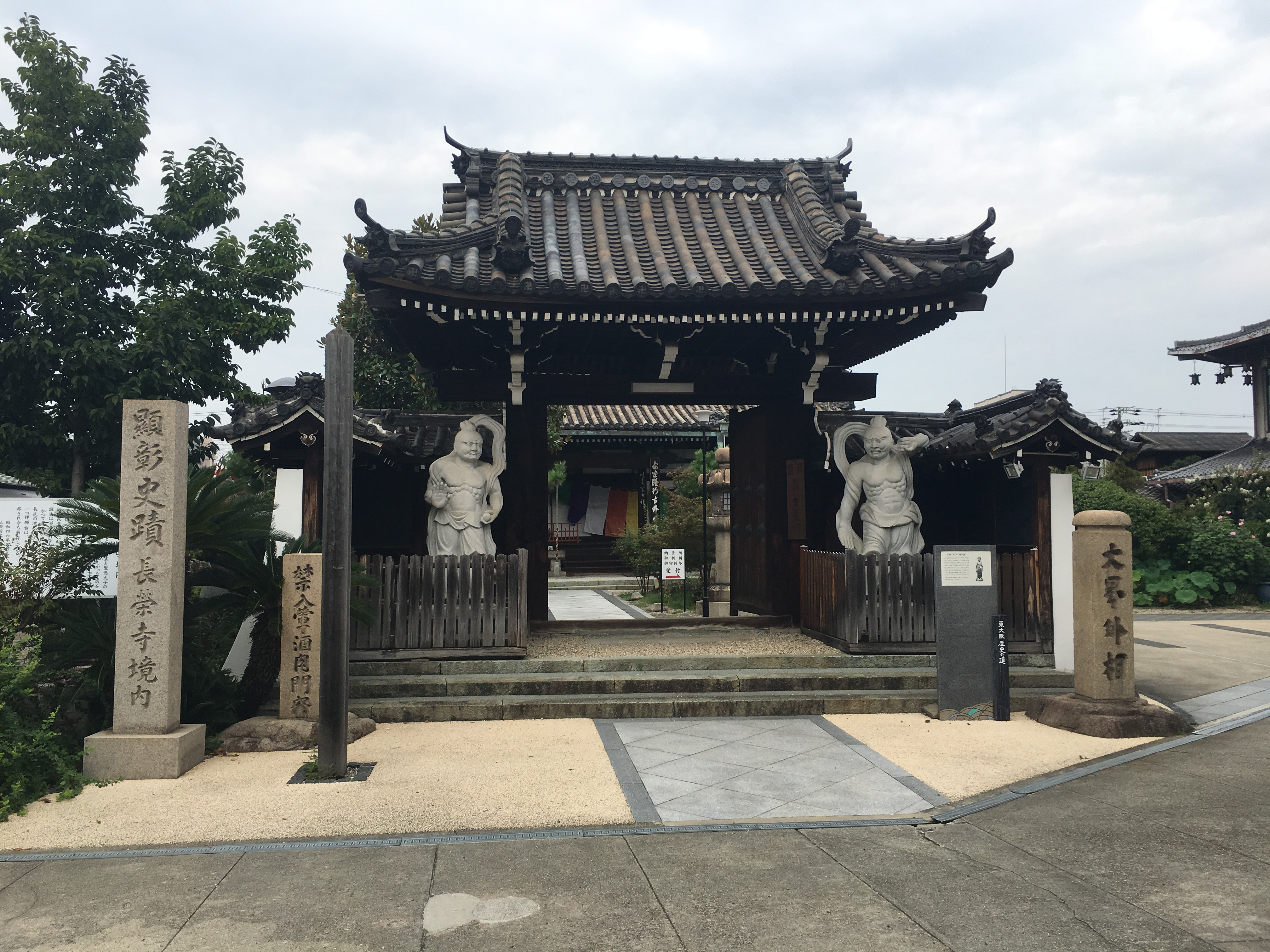 2019年8月、長栄寺で撮影。